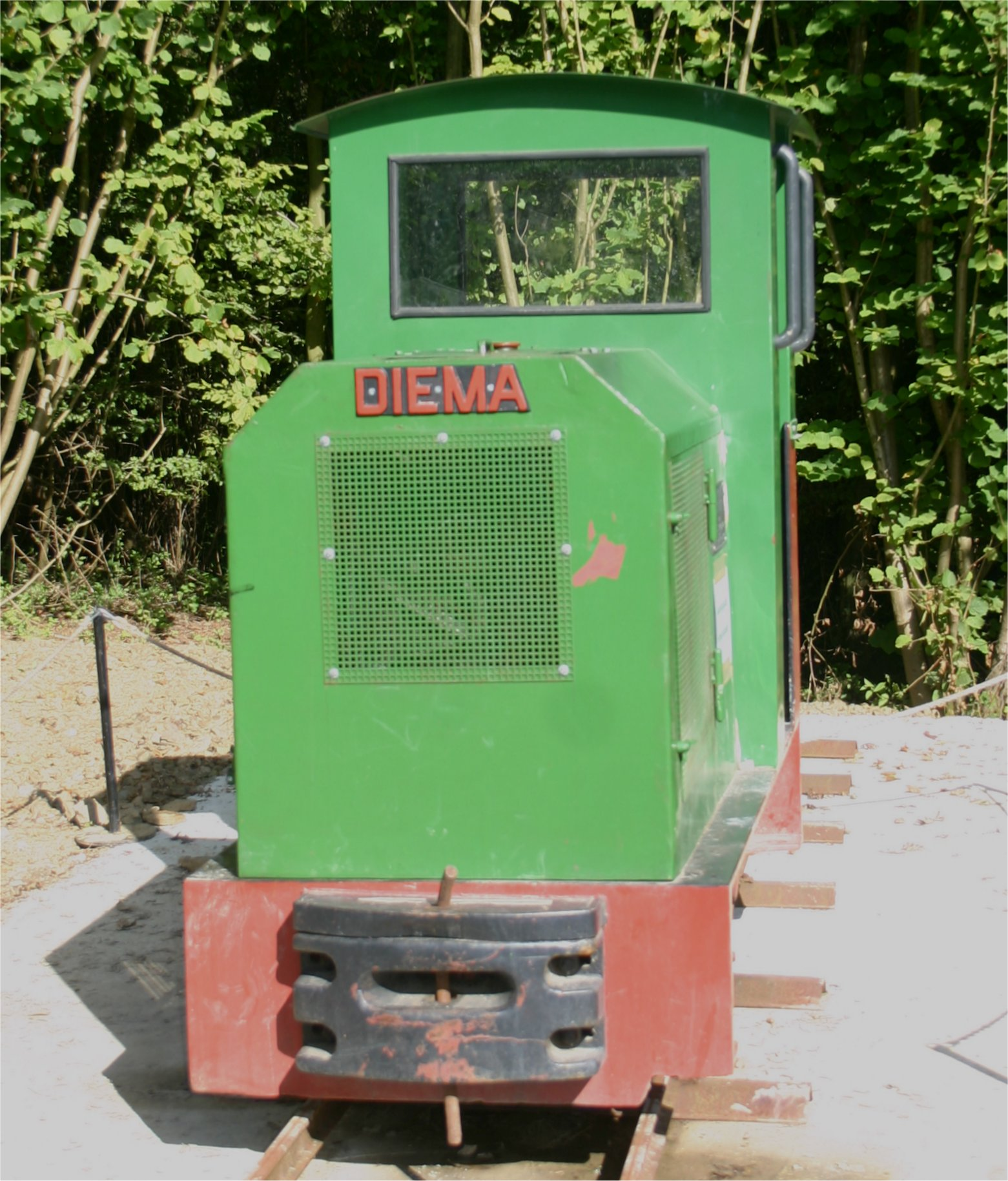 Eine der 3 Feldbahnloks für die neue Strecke